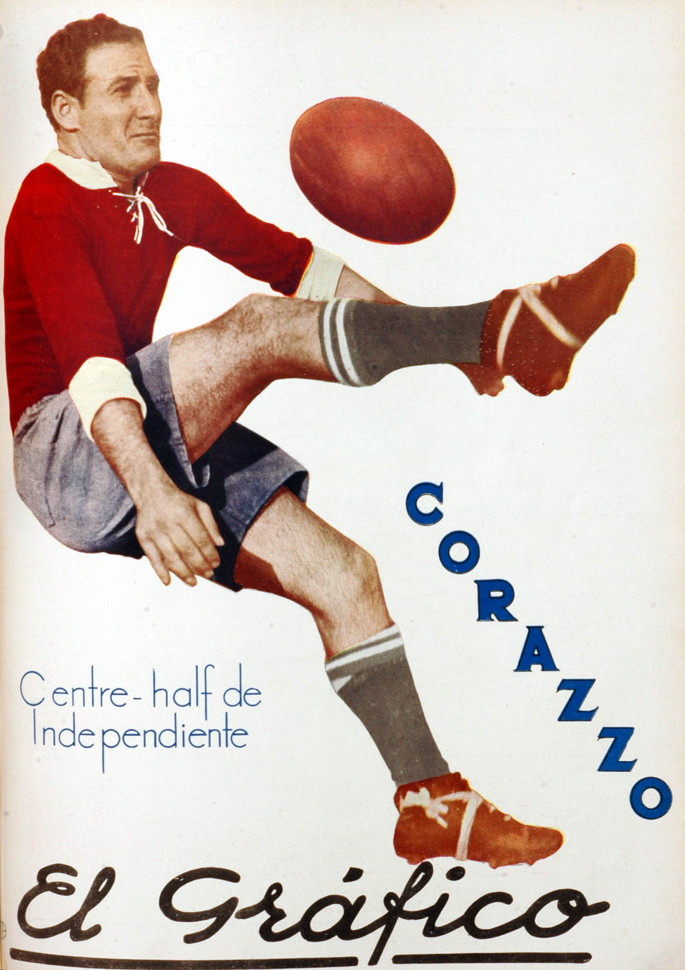 El Grafico del 16 de Abril de 1932. Edicion 666